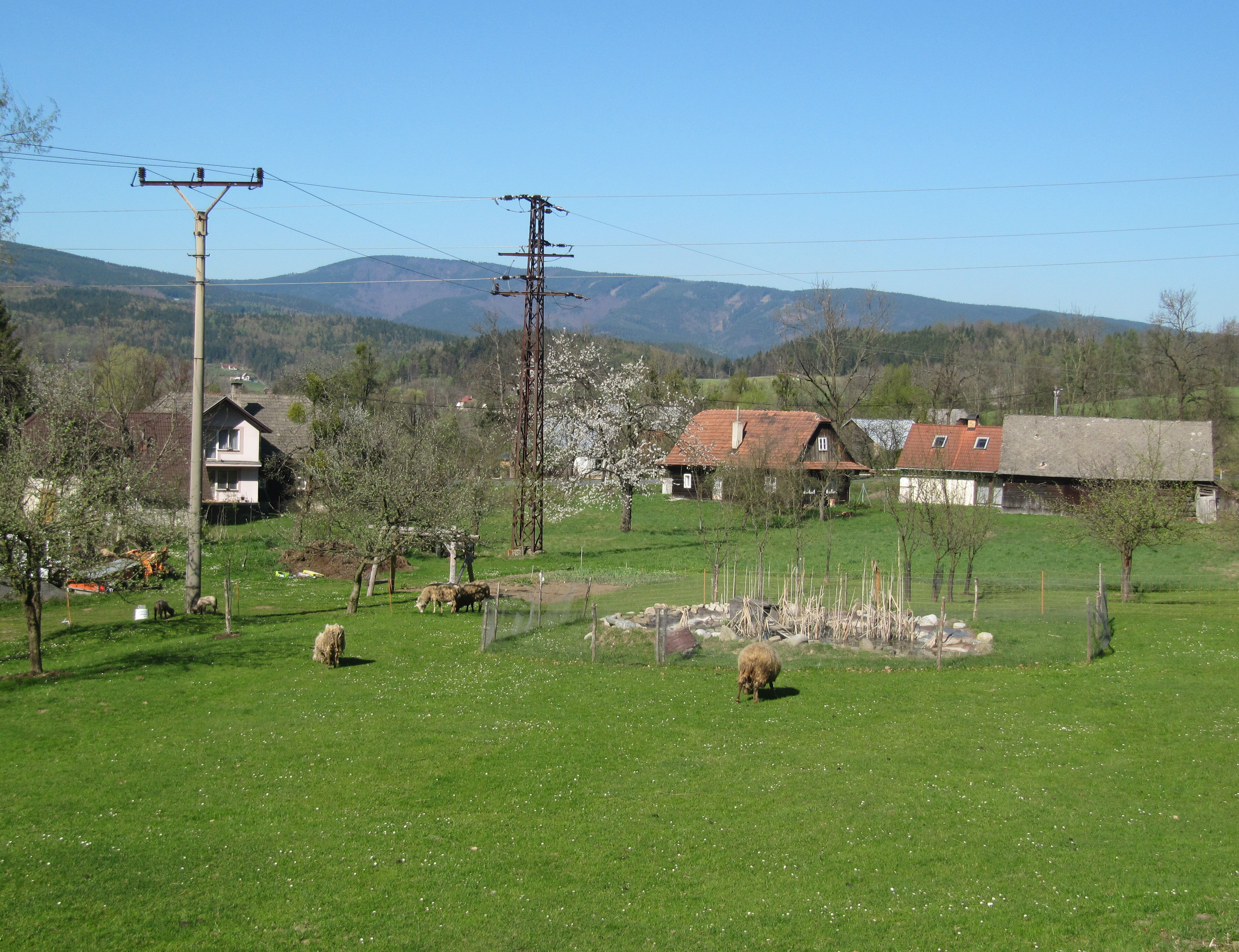 Solanec pod Soláněm